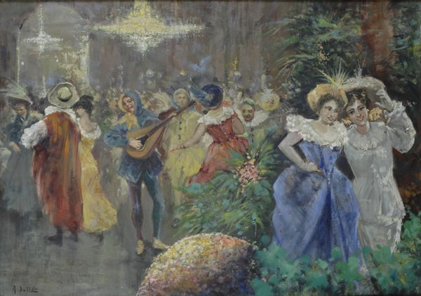 Arnaldo De Lisio 'Festa in maschera', olio su tela, cm 49.5 x 69